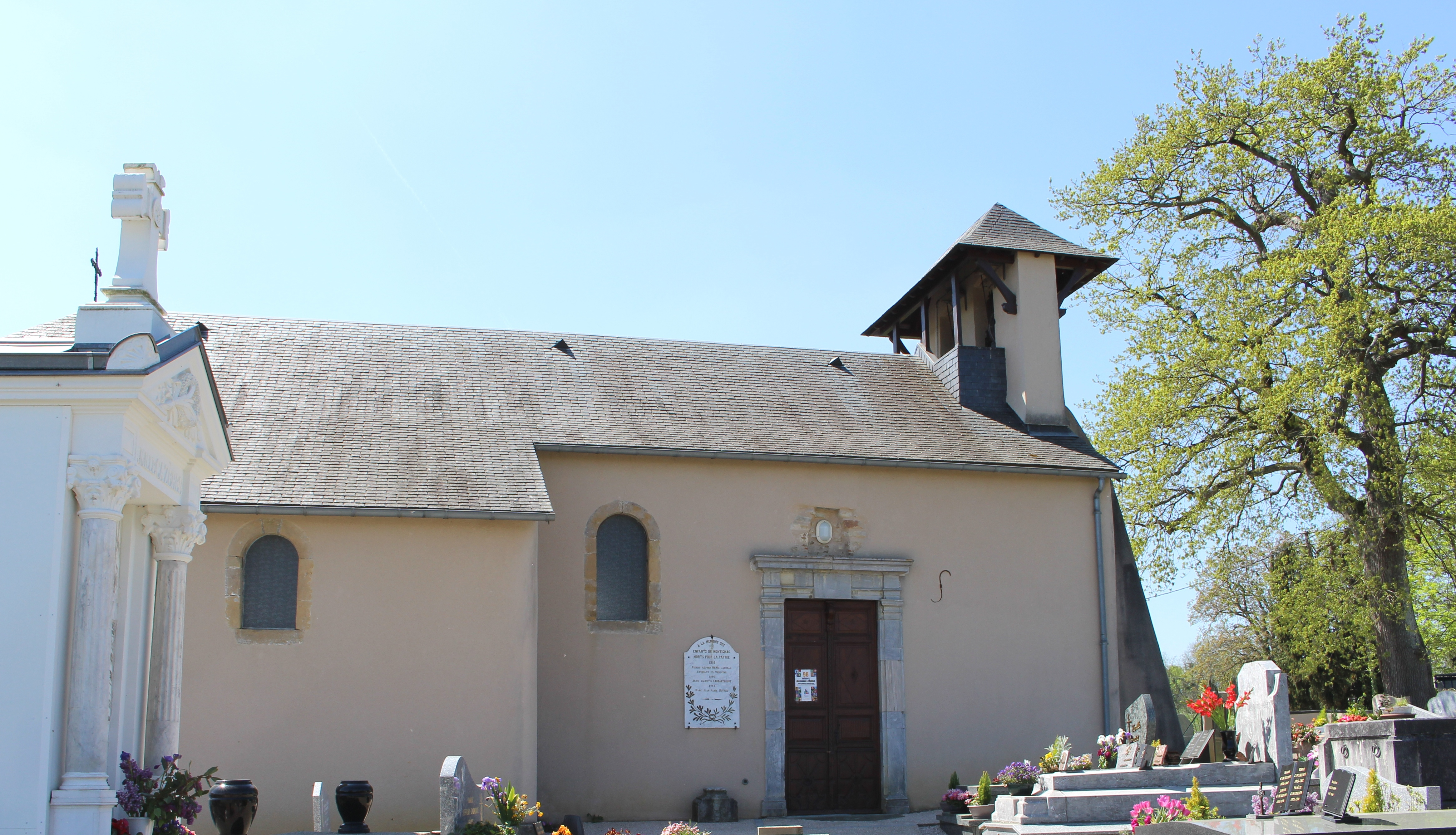 Église de l'Assomption de Montignac (Hautes-Pyrénées)